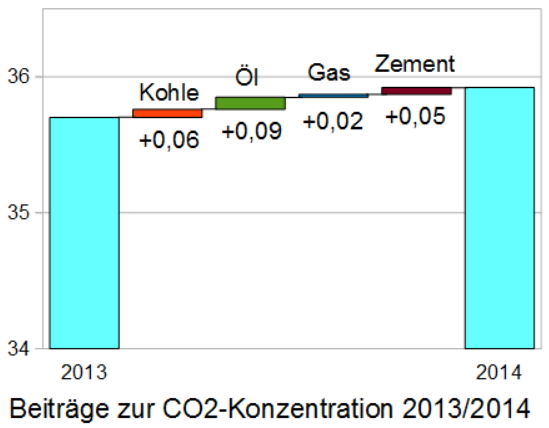 Beitrag CO2-Konzentration 2013/2014